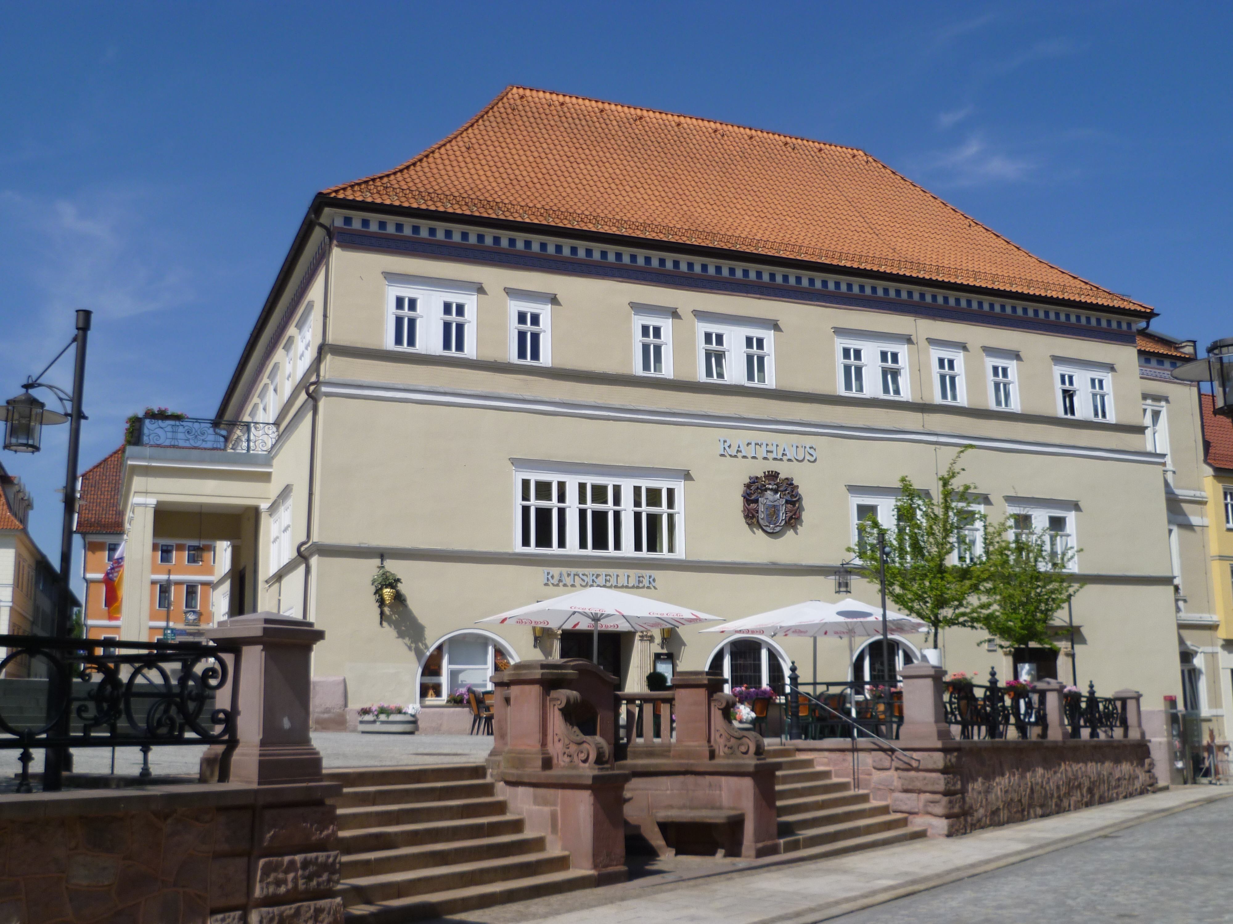 Das Rathaus von Sondershausen, Thüringen